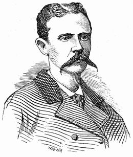 Modesto_Fonseca_Milán.jpg